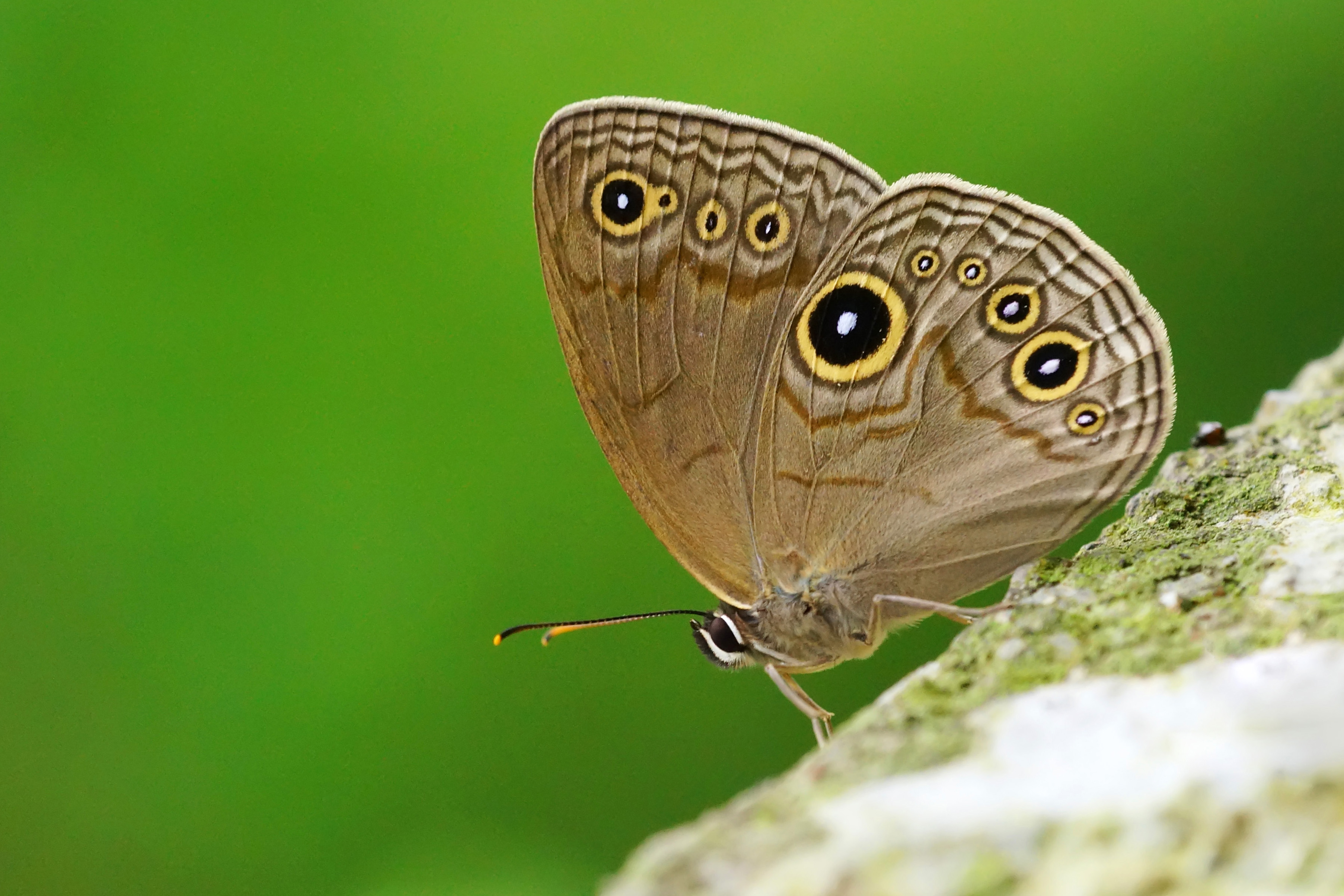 巴氏黛眼蝶 Lethe butleri periscelis